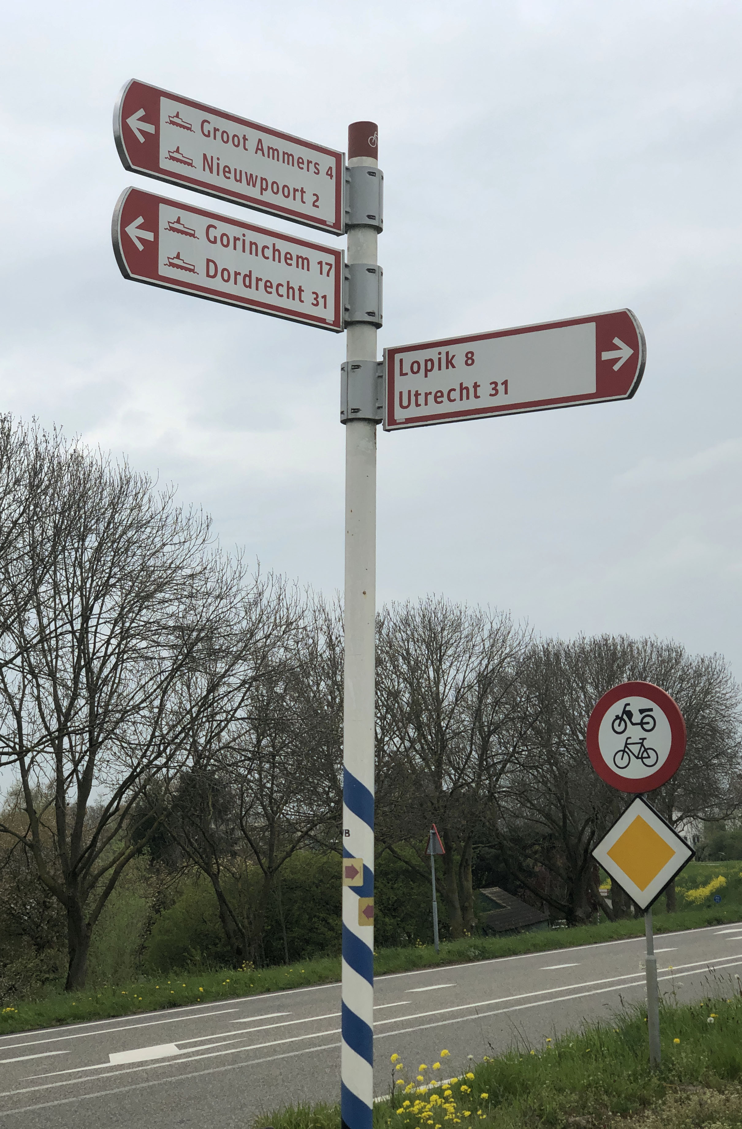 Wegwijzer toont vier veren over de Lek op betrekkelijk korte afstand van elkaar